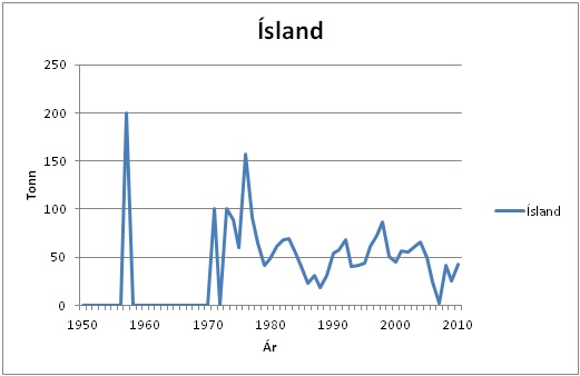 Veiðar Íslendinga frá 1950-2010, Heimild: Hagstofan